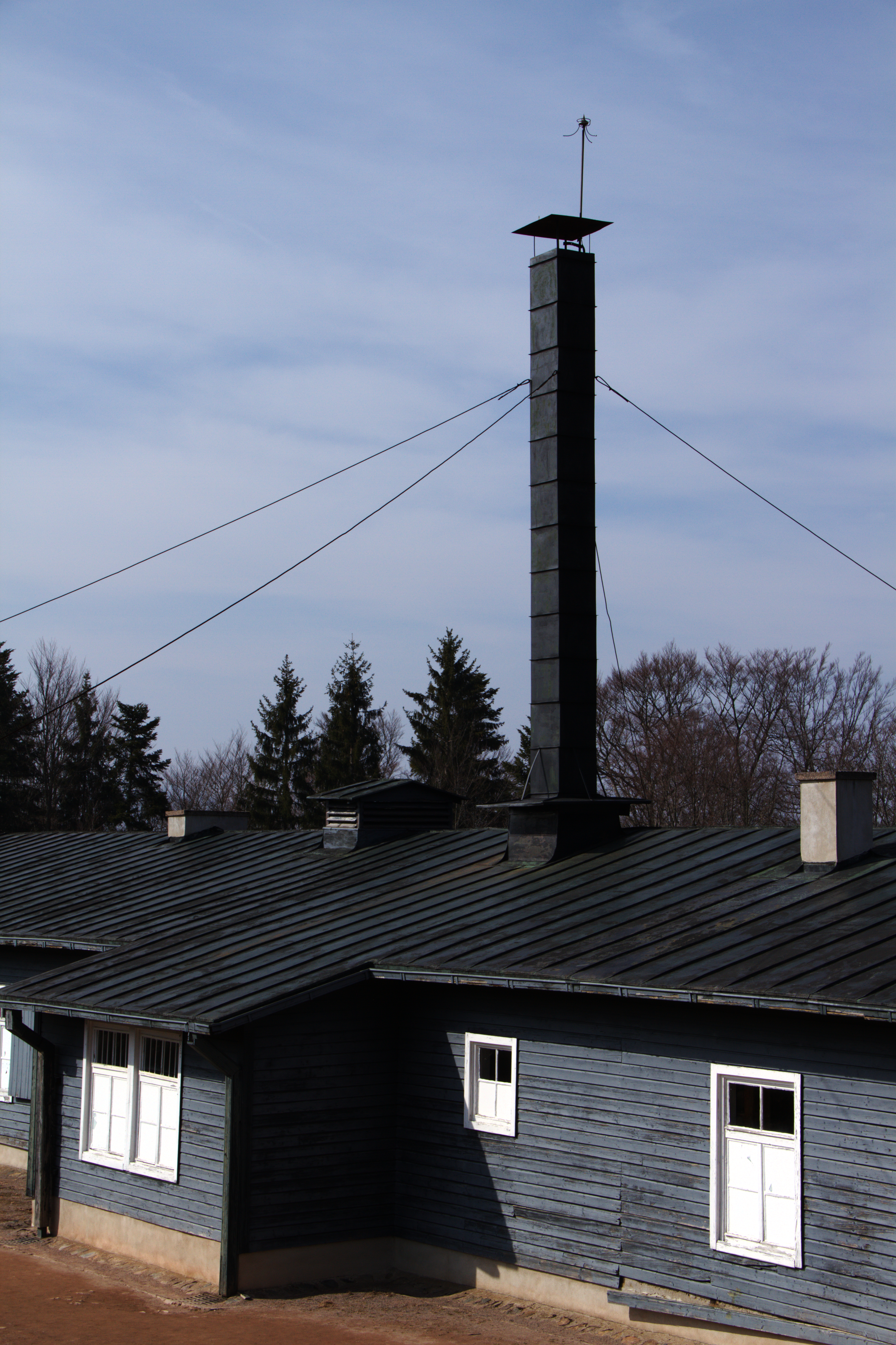 Camp de concentration de Natzwiller-Struthof. Le bâtiment du four crématoire.